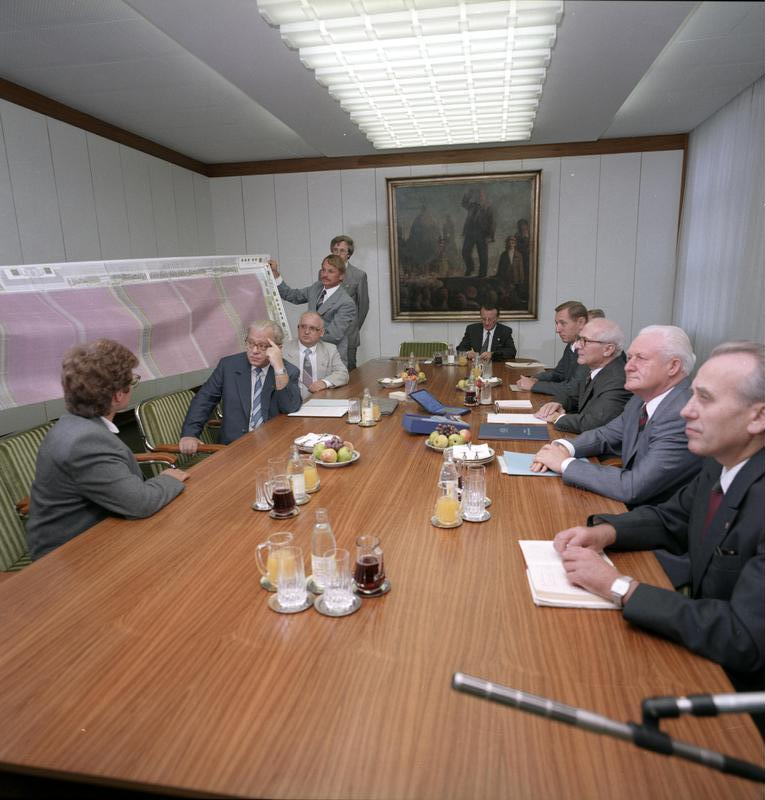 ADN-ZB/Franke/12/9/88/Berlin: 1-Megabit-Chip/ Die ersten in der DDR hergestellten 1-Megabit-Speicherschaltkreise wurden dem Generalsekretär des ZK der SED und Vorsitzenden des Staatsrates der DDR, Erich Honecker, von einem Kollektiv des Carl Zeiss Jena übergeben. Bei der Übergabe waren anwesend: Günter Mittag, Mitglied des Politbüros und Sekretär des ZK der SED (2.v.r.), Felix Meier, Minister für Elektrotechnik/Elektronik (4.v.r.), Generaldirektor Prof. Dr. Wolfgang Biermann (2.v.l.), Mitglied des ZK der SED. Hier gilt einem Schaltkreisentwurf im Maßstab 1:300 die Aufmerksamkeit.